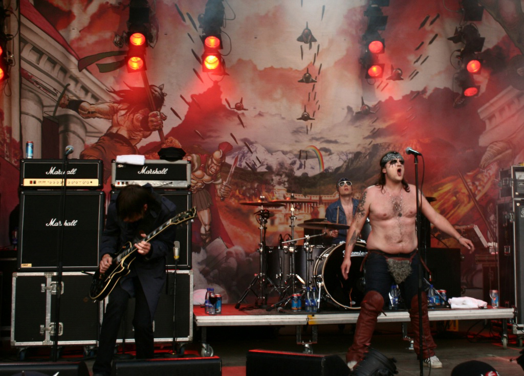 They must be destroyed - Turboneger under Vikafestivalen